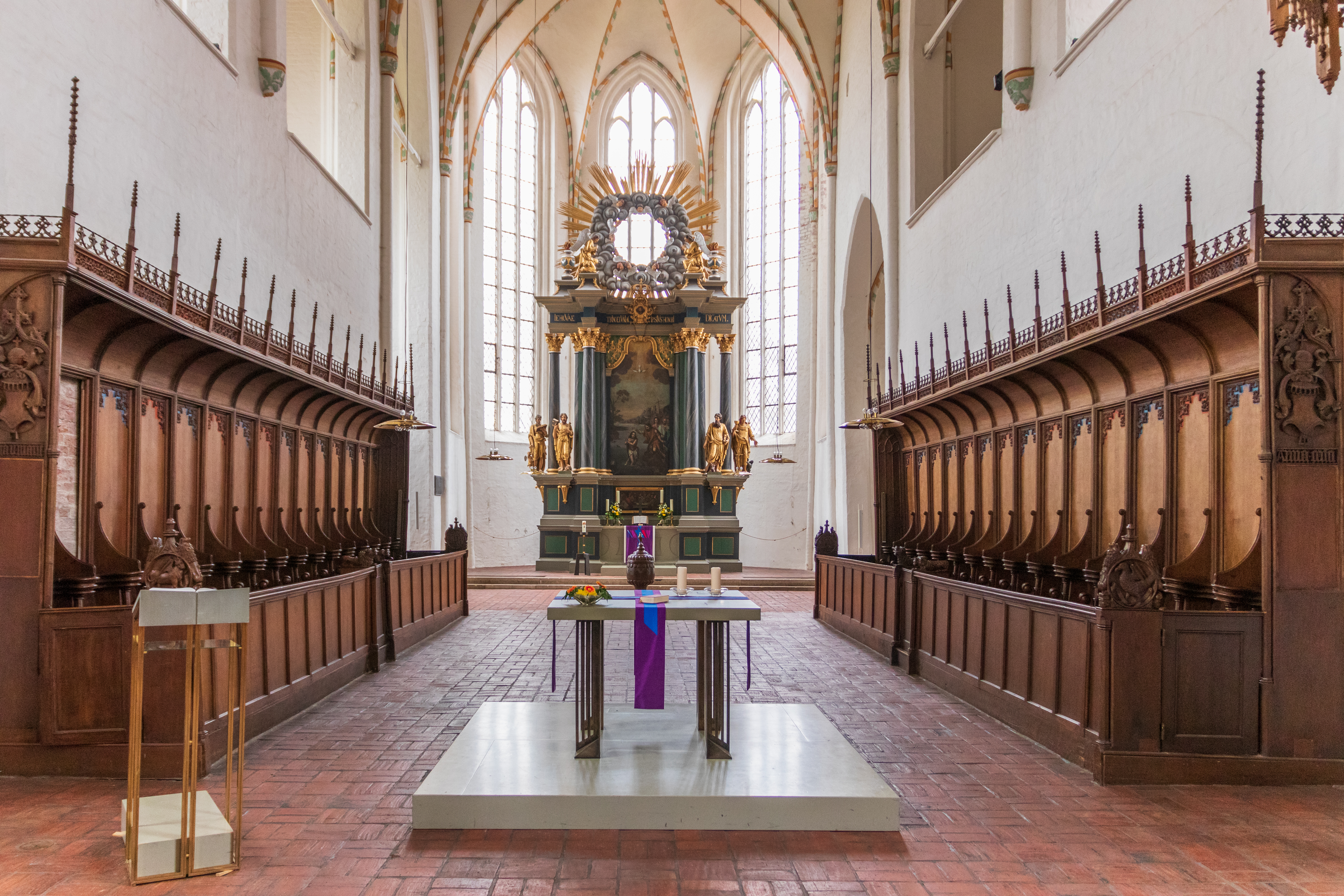 Klosterkirche Bordesholm - Gestühl